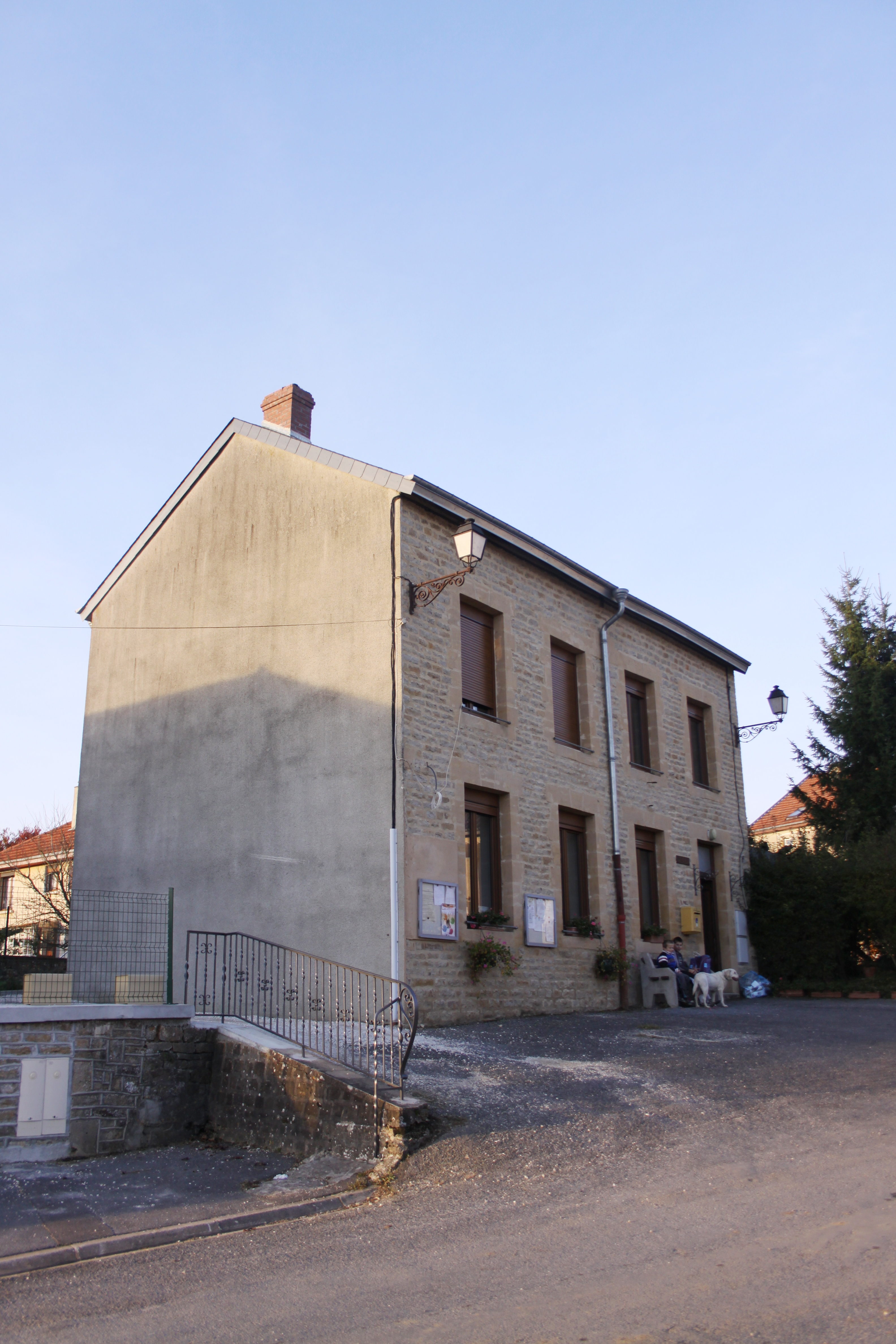 Village Ardennais